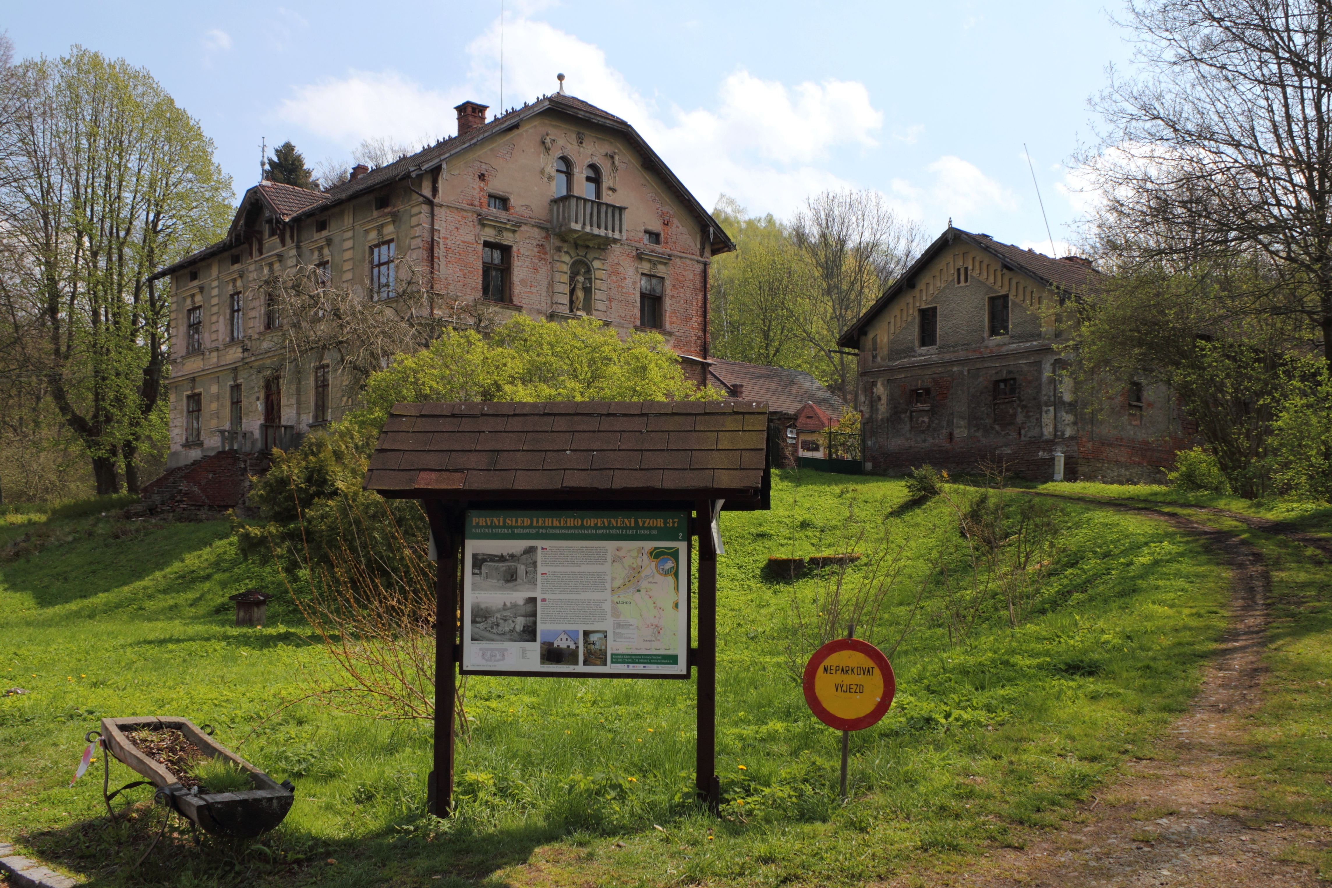 Běloves, Náchod